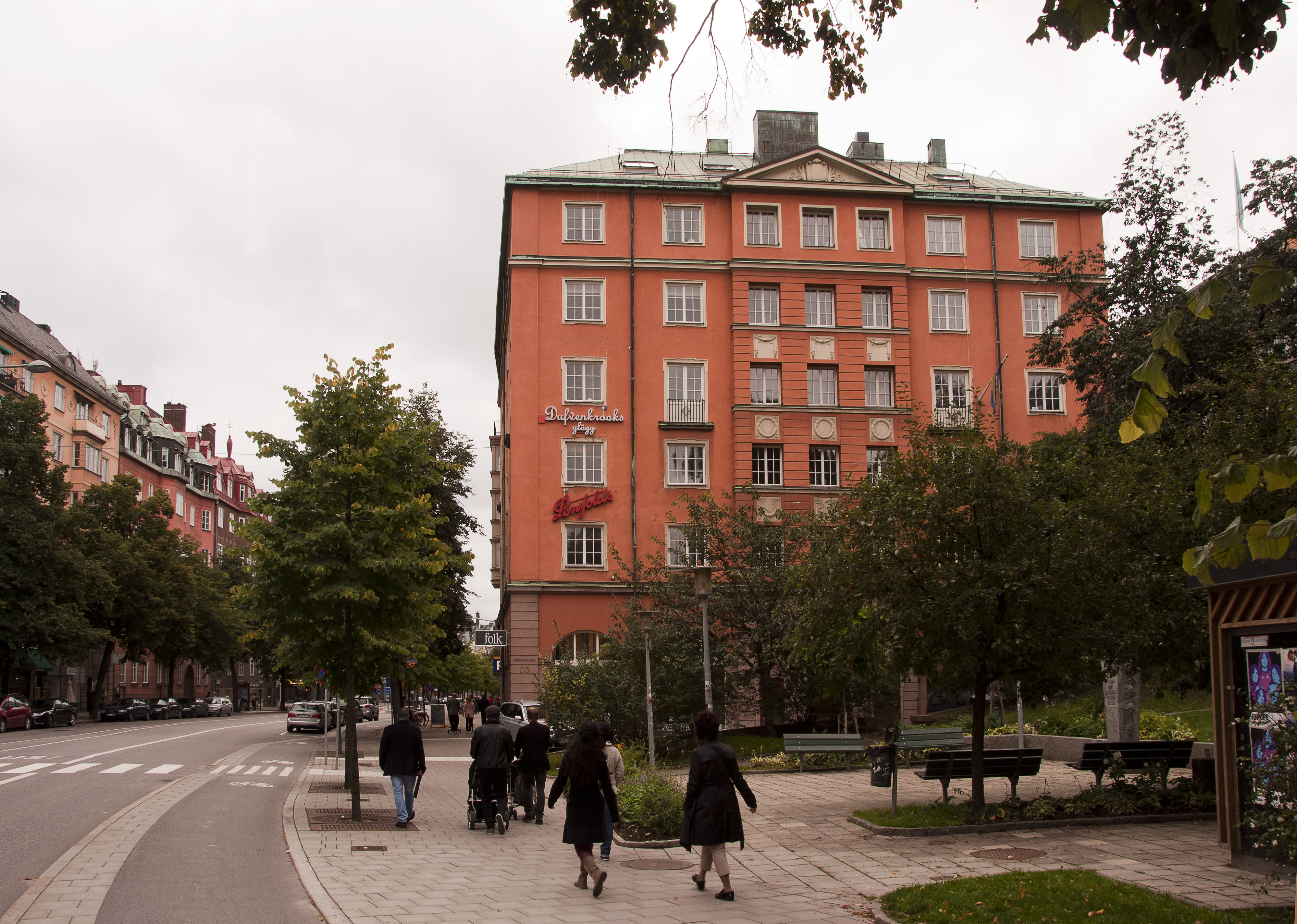 Birger Jarlsgatan 55